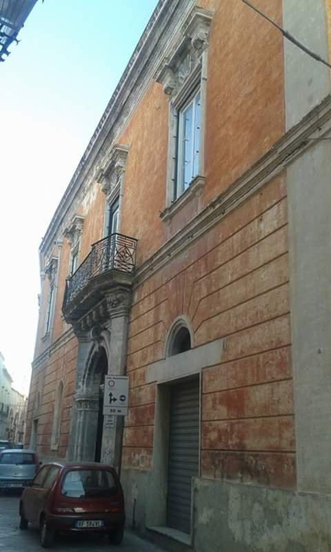 Palazzo Chiodo a Nardò (LE)-PUGLIA-ITALY